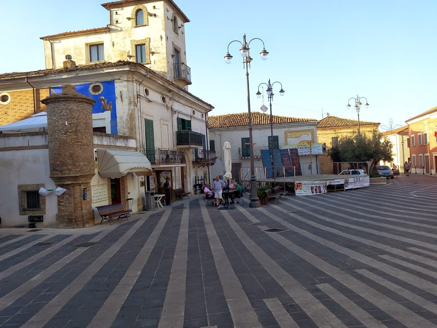 Gita a Treglio 13 Agosto 2014